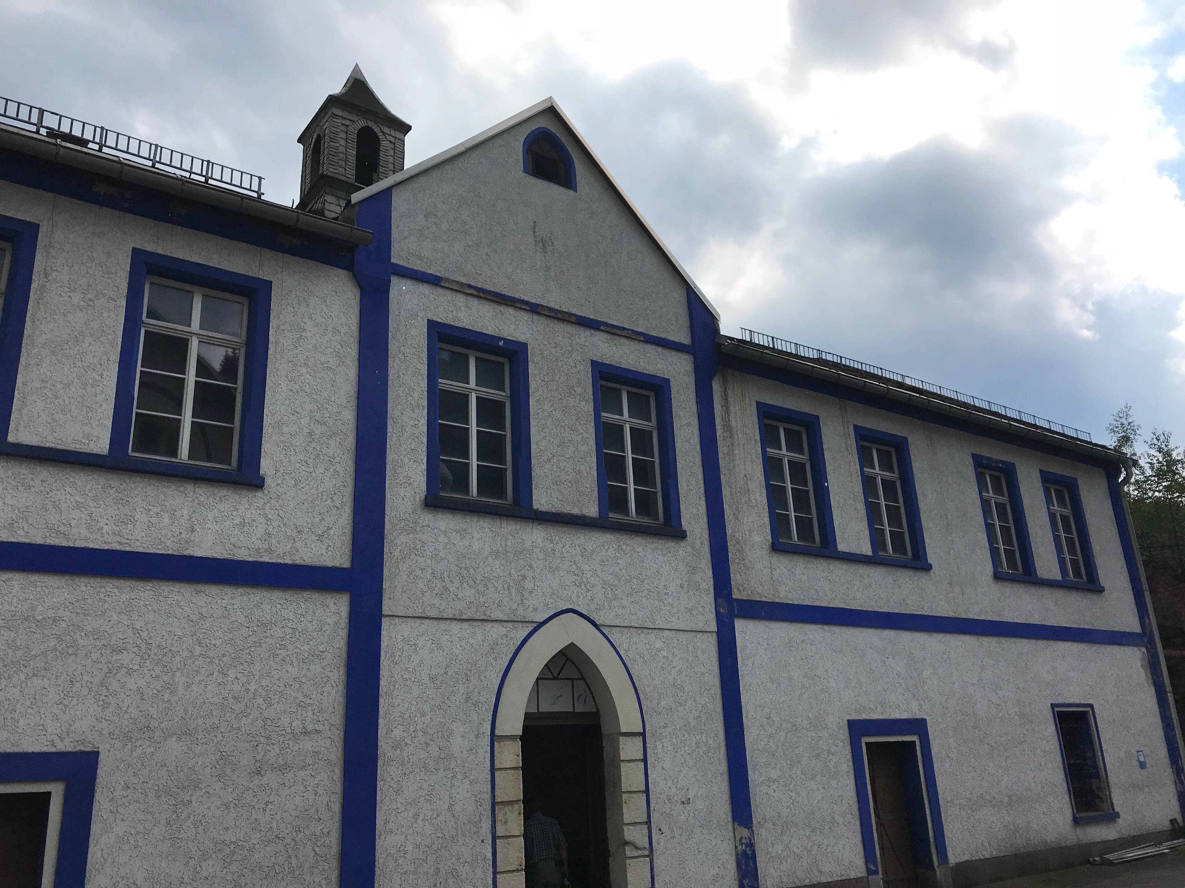 Schindlersches Blaufarbenwerk, Herrenhaus (2018)